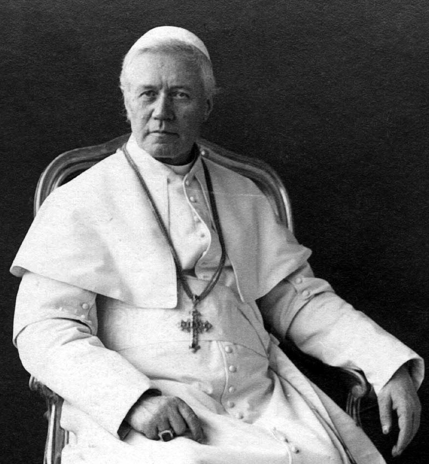 Paus Pius X